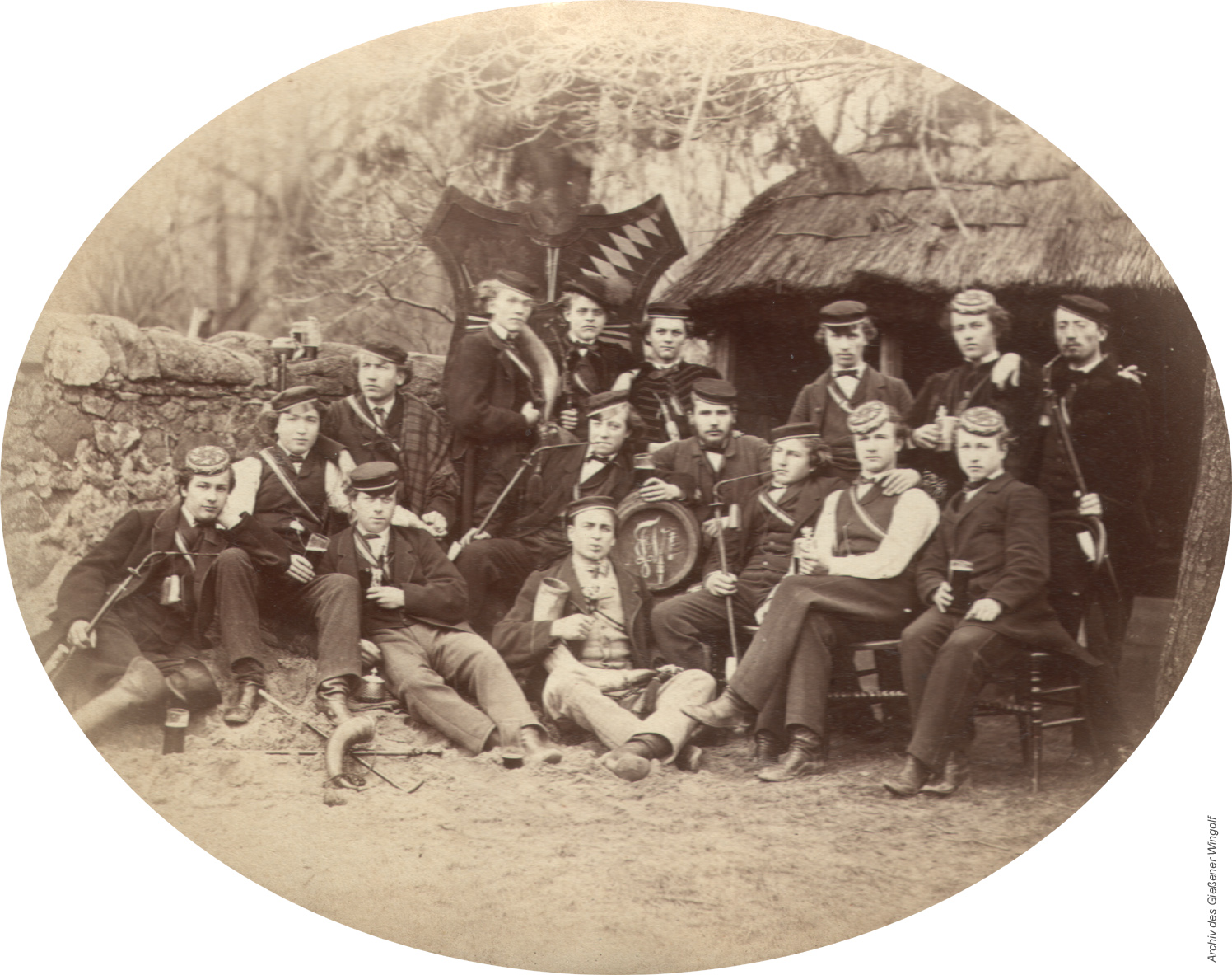 Aktivitas des Gießener Wingolf im Sommersemester 1863 während eines Exbummels